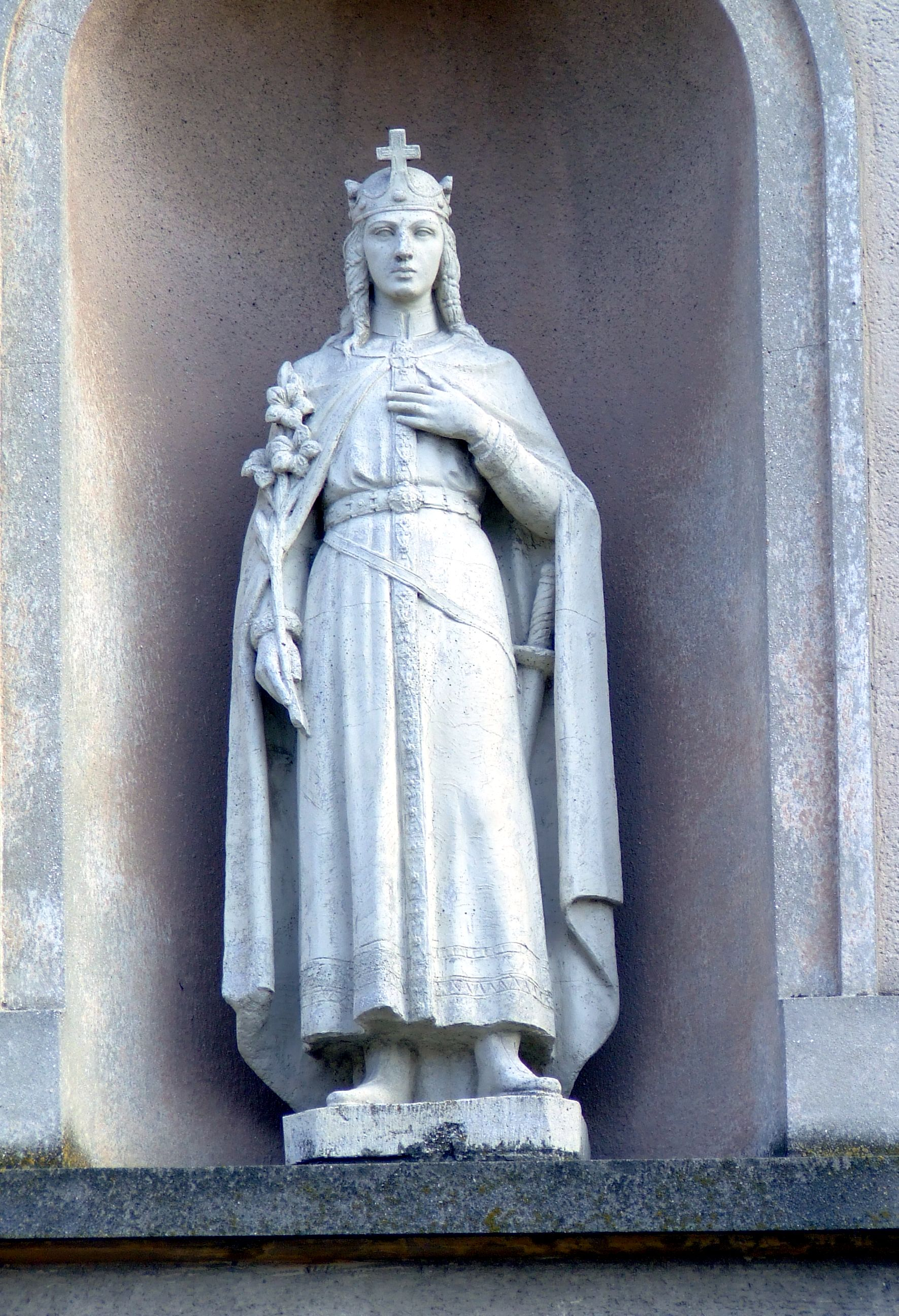 Árpád-házi Szent Margit. Fülkeszobor a peregi Szent Mihály-templom homlokzatán